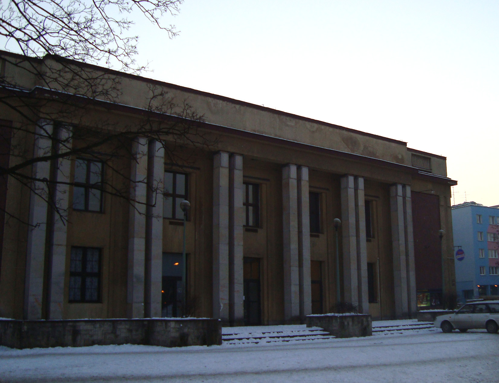 Kino Światowid w Krakowie